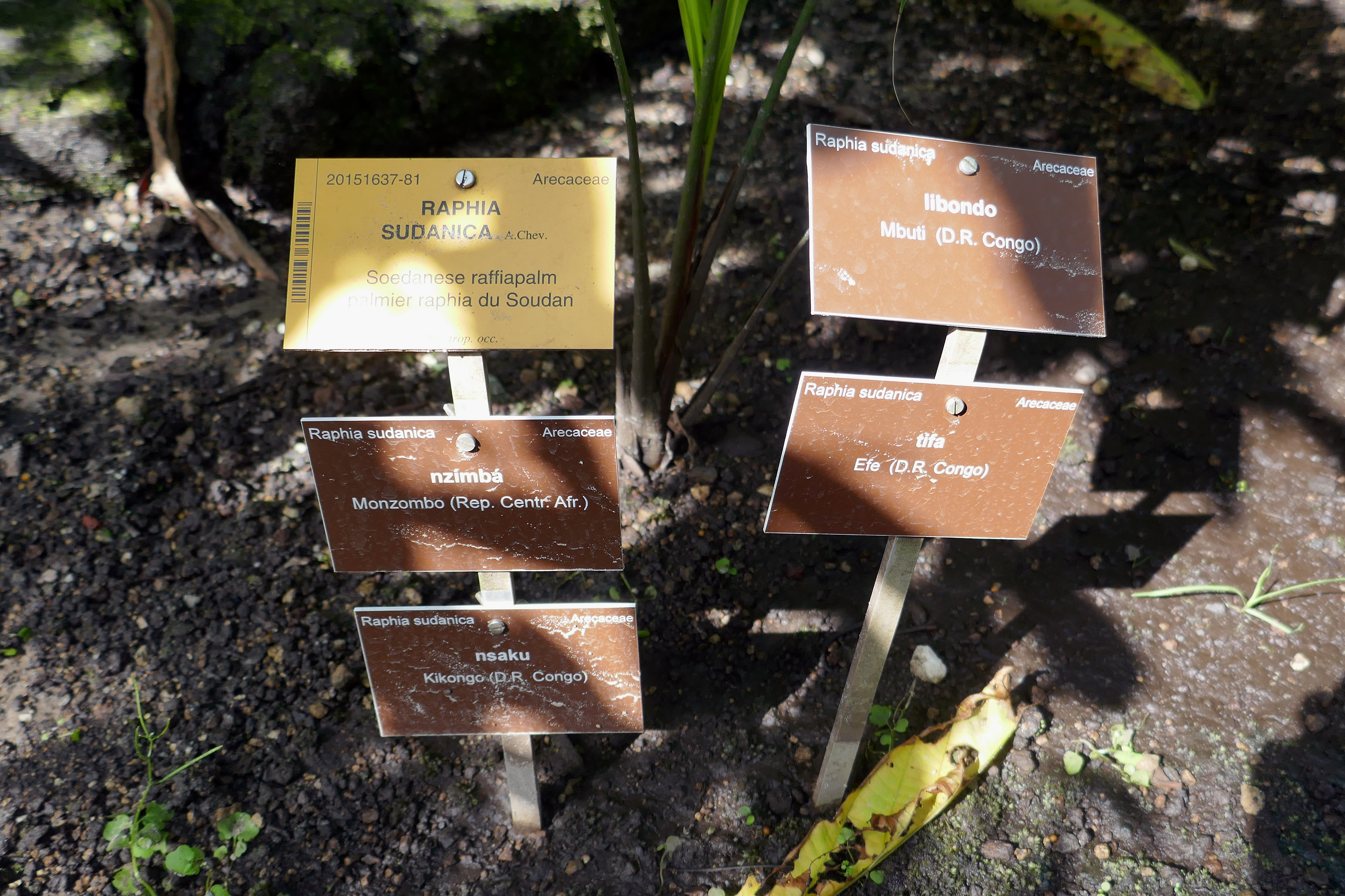 Raphia sudanica A.Chev. nl: Soedanese raffiapalm fr : Palmier raphia du Soudan mbuti (D.R. Congo) : libondo efe (D.R. Congo) : tifa kikongo (D.R. Congo) : nsaku monzombo (Rép. centrafricaine) : nzimba Afrique tropicale occidentale. Jardin botanique Meise (Belgique).